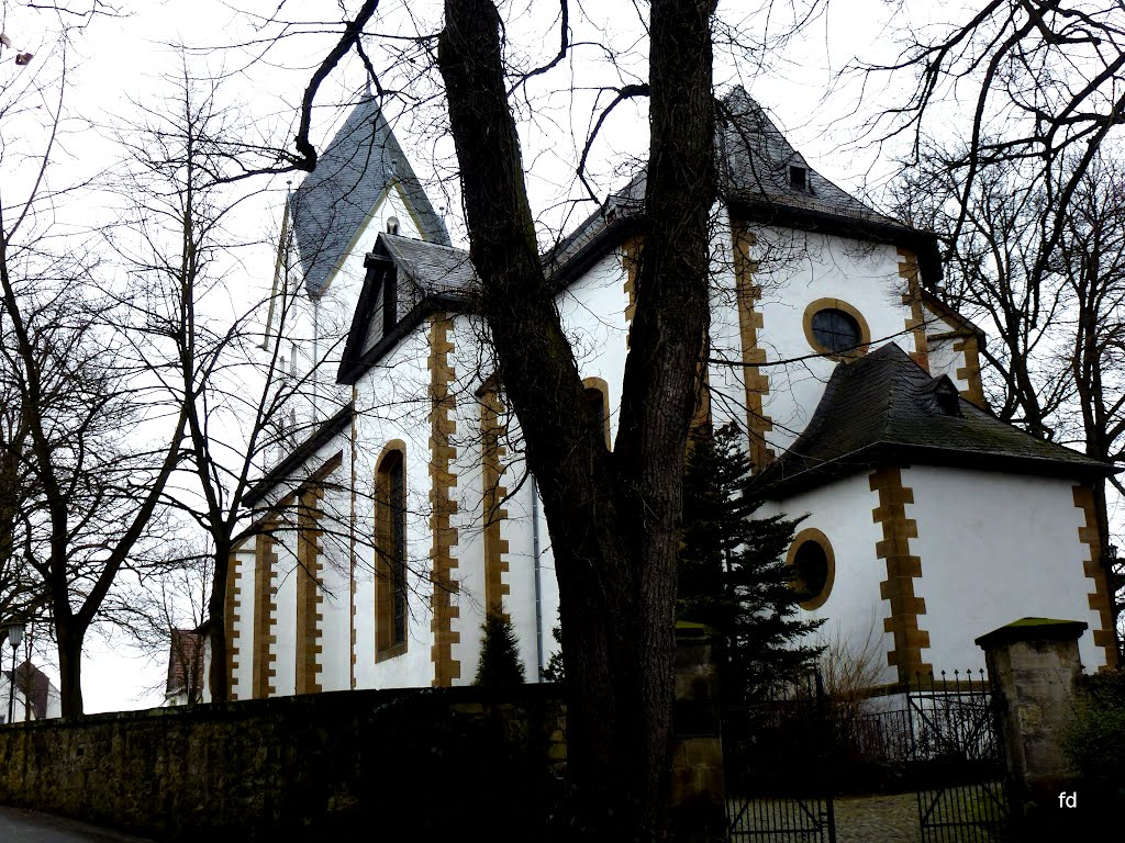 St.Johannes Baptist Kirche in Siddinghausen erbaut 1723.